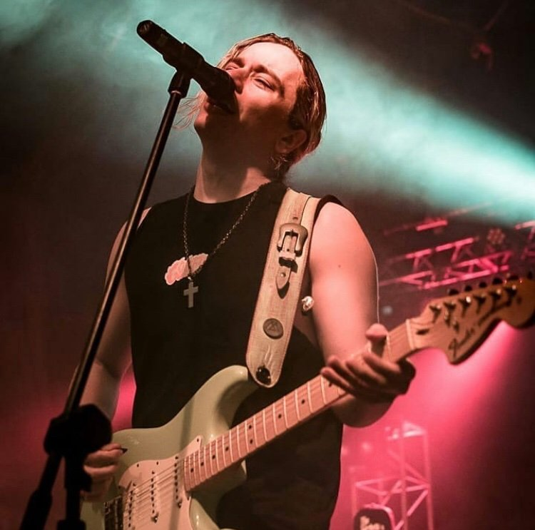 Guido Armido cantando y tocando laguitarra en un show musical.